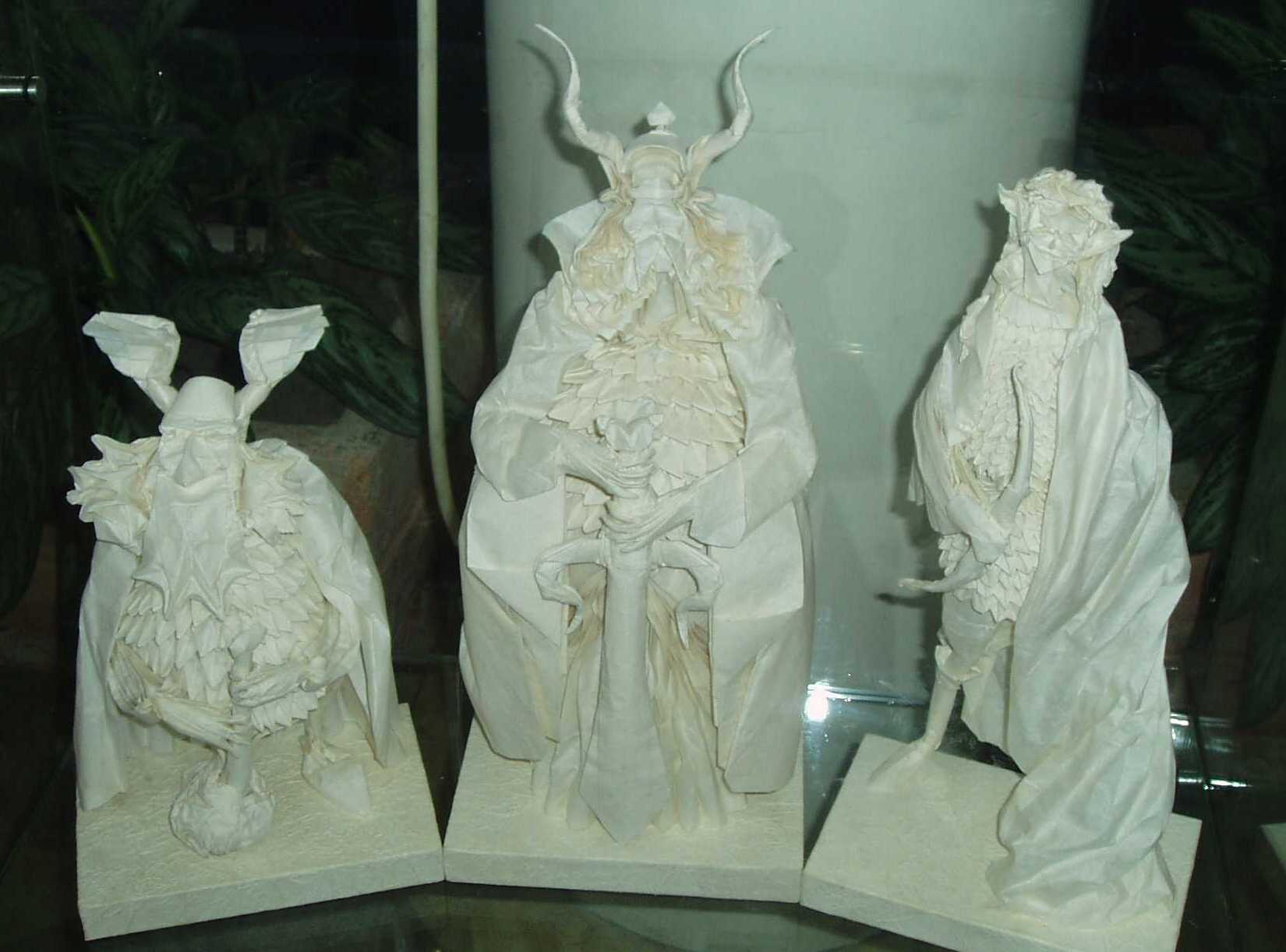 שלושת המלכים מהספר שר הטבעות